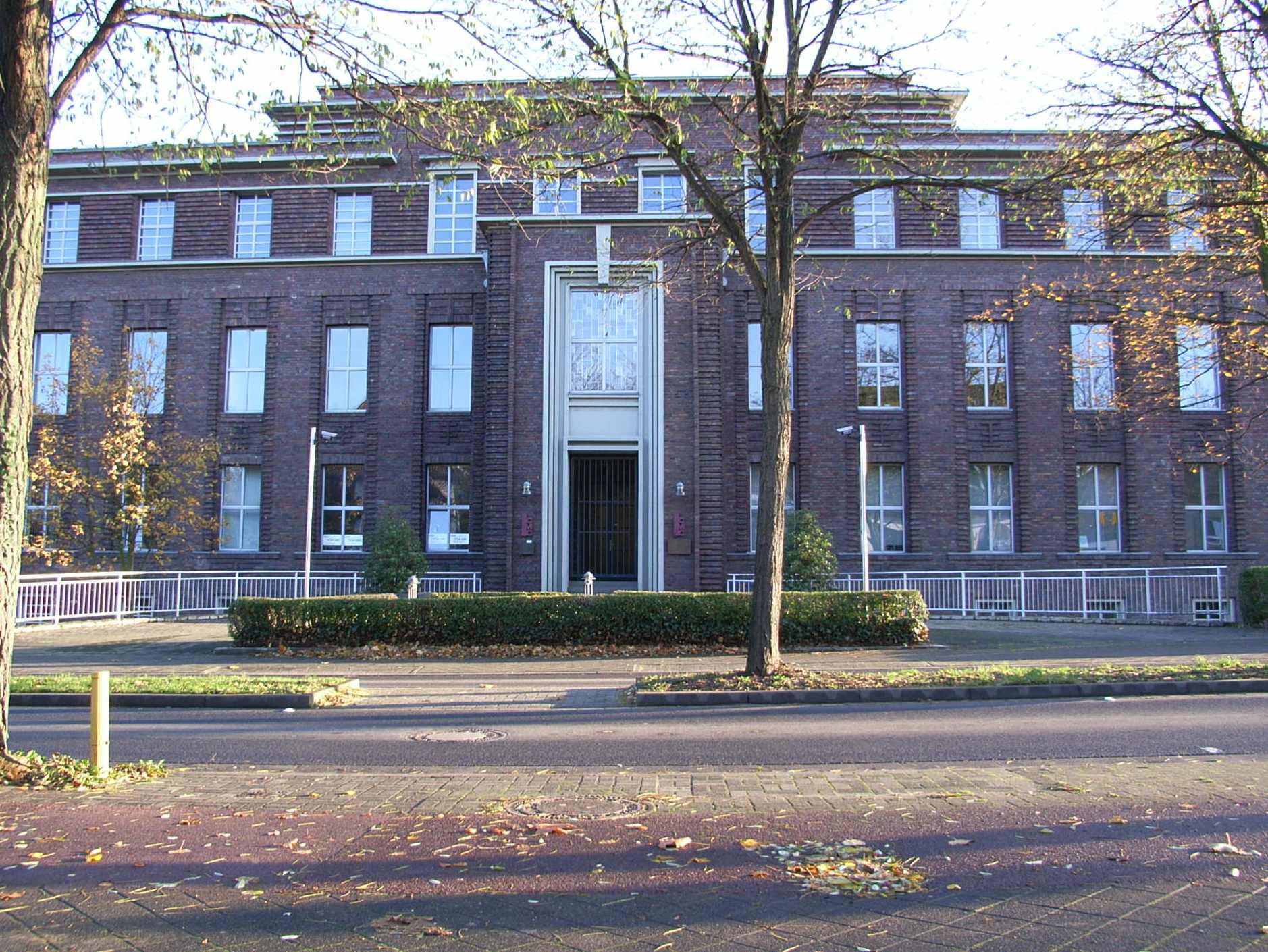 ehemaliges Verwaltungsgebäude der Zeche Carolus Magnus Übach-Palenberg